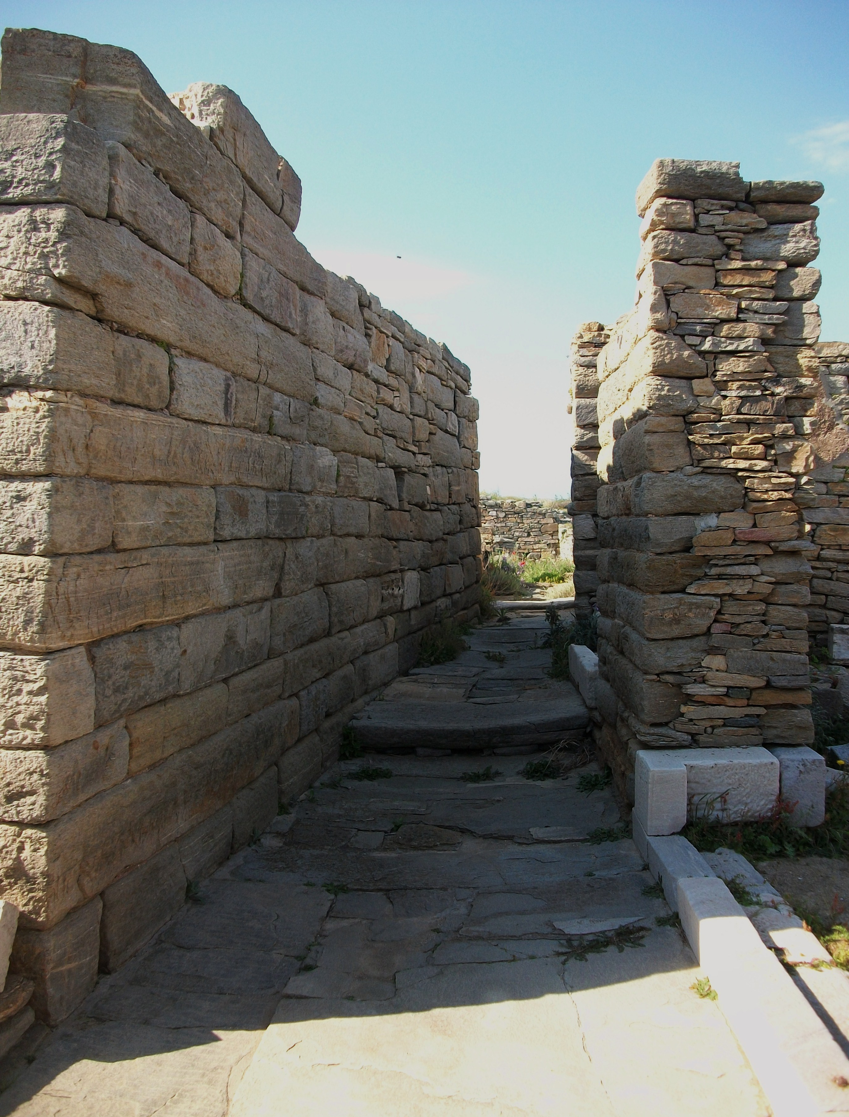 Barri del teatre, carrer, Delos.